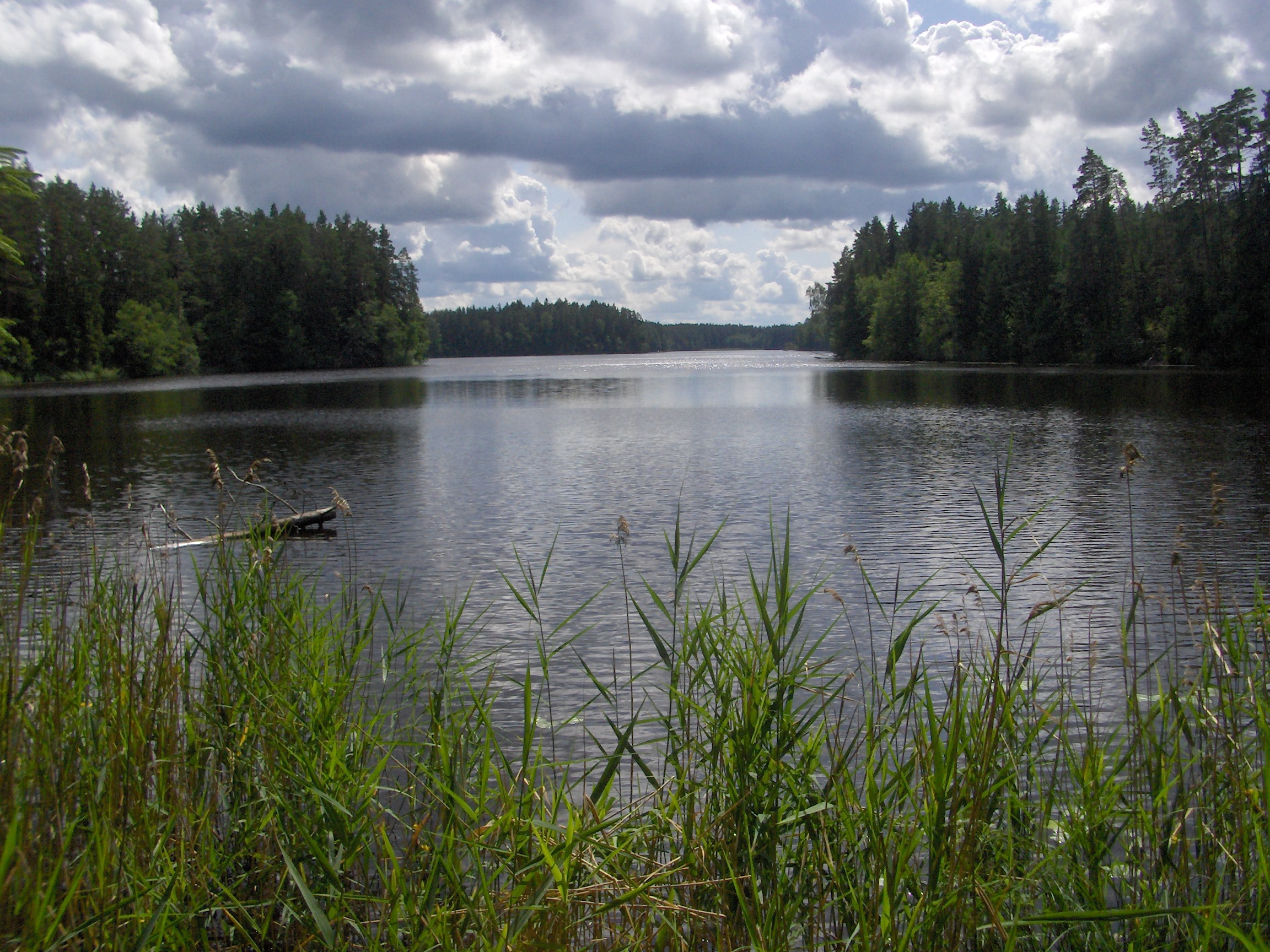 Mordangas ezers no ziemeļu puses